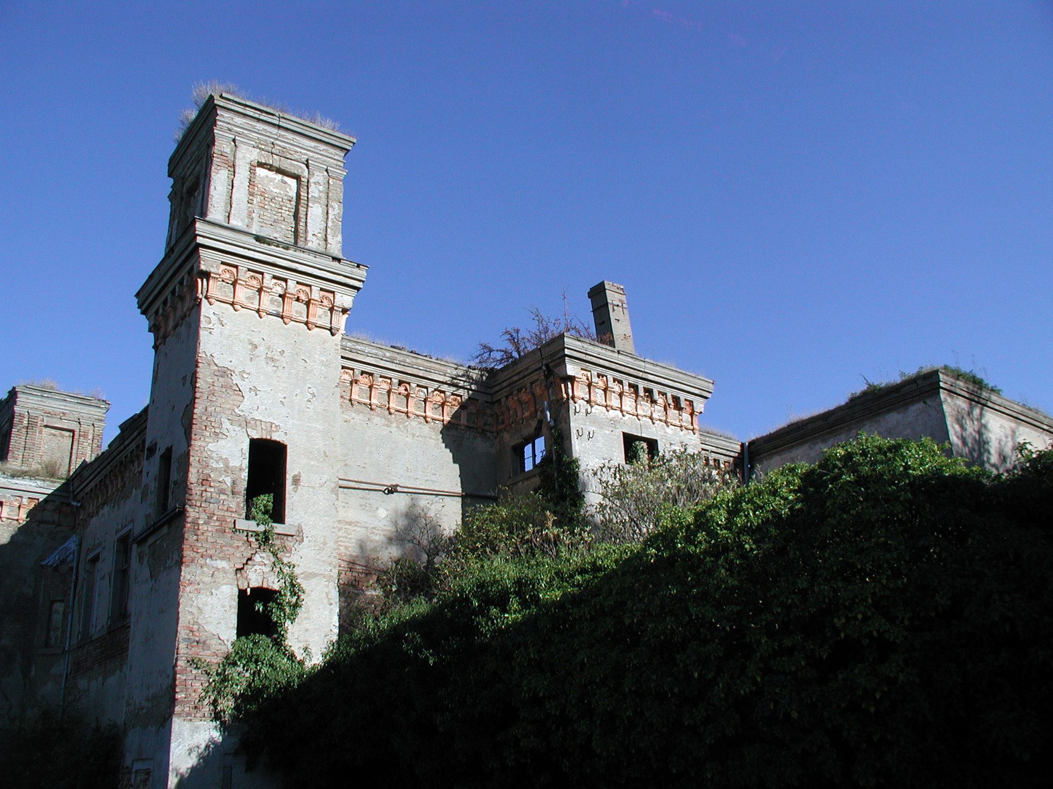 Das ehemalige Herrenhaus der Burg-Bornheim-Hemmerich, ein Ortsteil der Stadt Bornheim (Rheinland) nordwestlich von Bonn. Die Burg überstand beide Weltkriege ohne Schäden, wurde aber in den Nachkriegswirren 1945 von marodierenden, ehemaligen Kriegsgefangenen und Fremdarbeitern in Brand gesteckt. Das Herrenhaus brannte dabei bis auf die Grundmauern nieder und blieb ruinös, aber dennoch imposant bis heute erhalten.